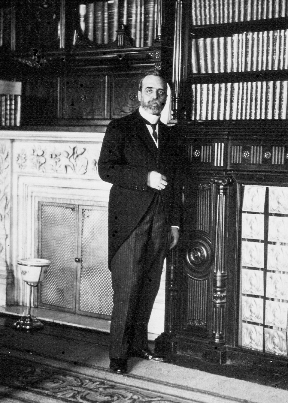 José Sánchez Guerra (1859-1935), político español.